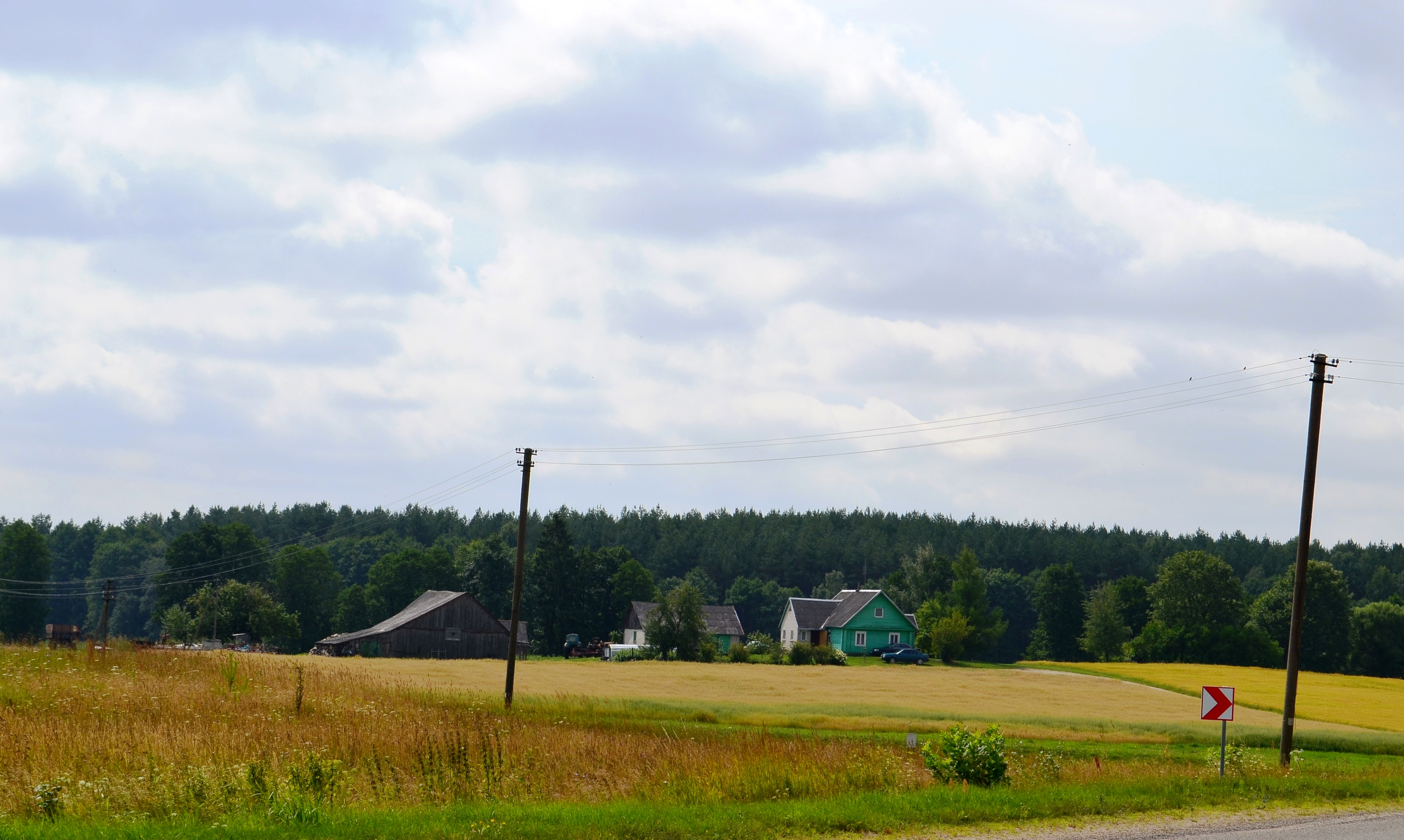 Raupiškis, Luokesos sen., Molėtų r.